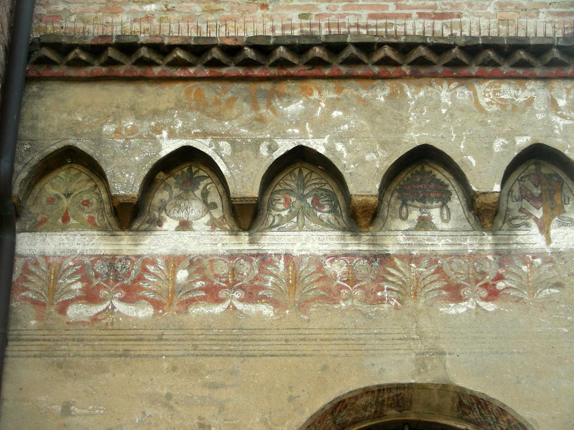 Padova, chiesa di San Niccolò, facciata, tracce di affreschi a destra del portale